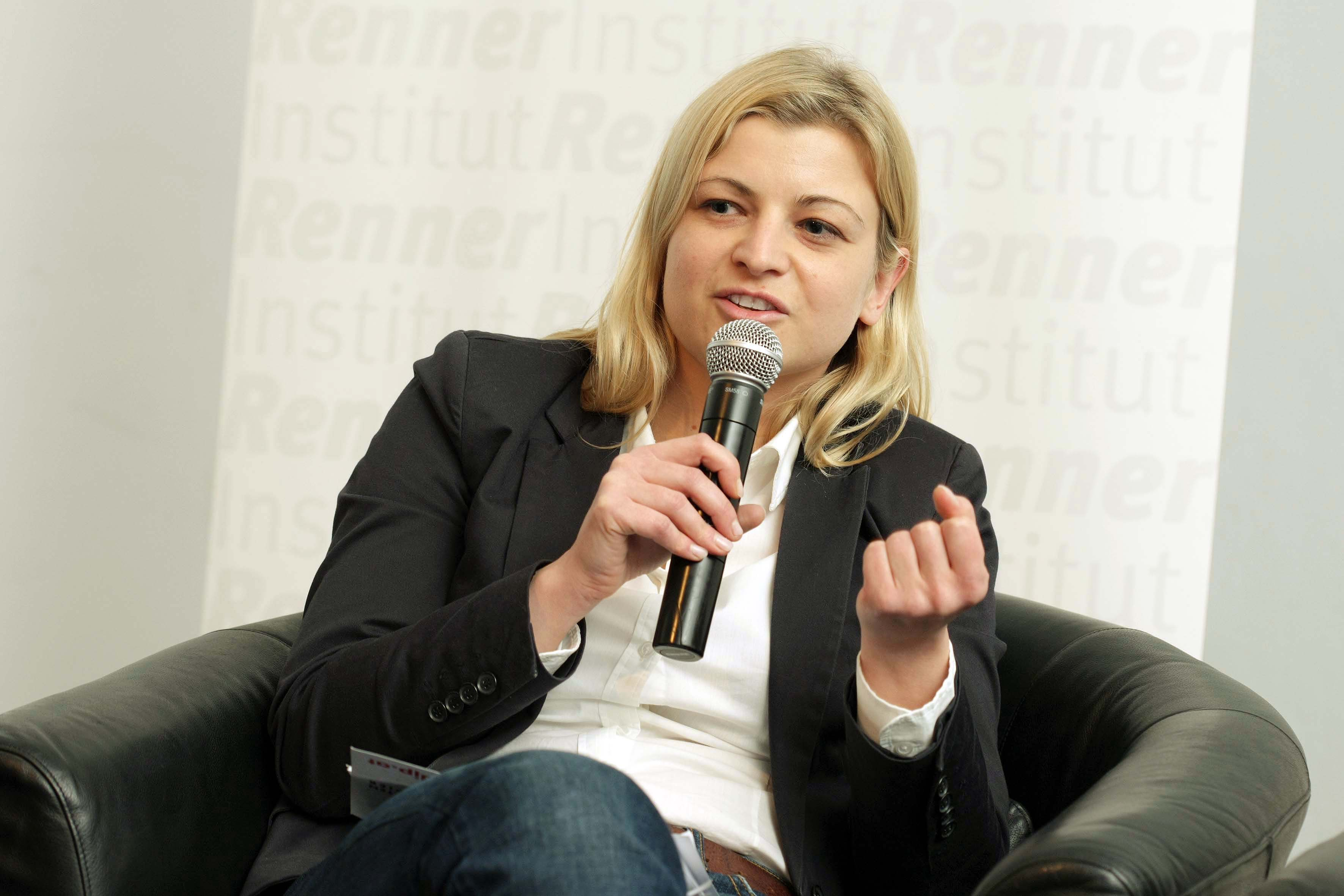 Barbara Teiber Foto: Mag. Gisela Ortner